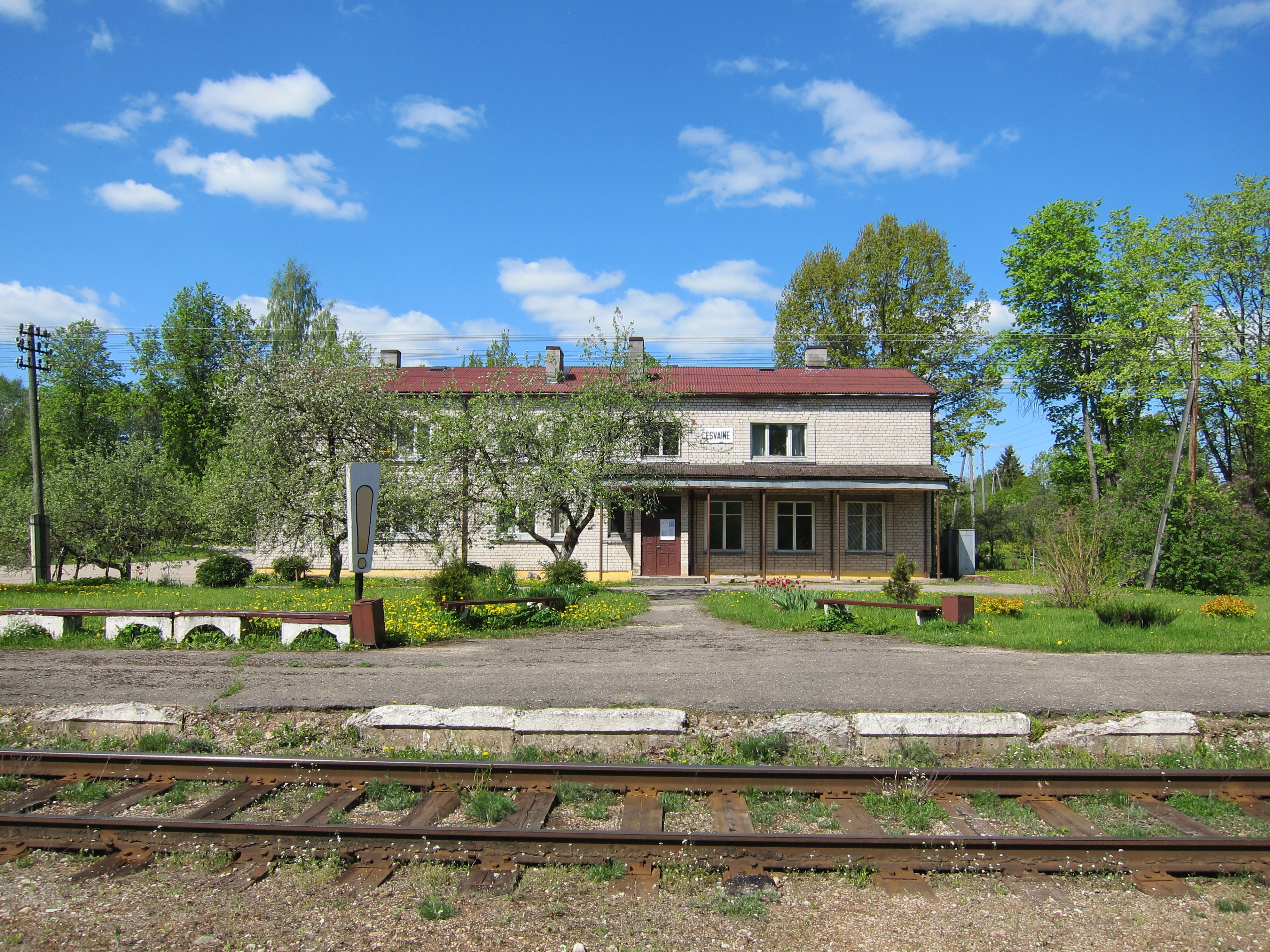 Cesvaines stacijas ēka.